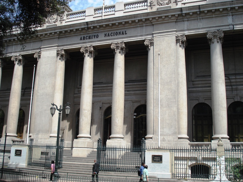 Sede del Archivo Nacional de Chile, ubicado a un costado de la Biblioteca Nacional, en la ciudad de Santiago.